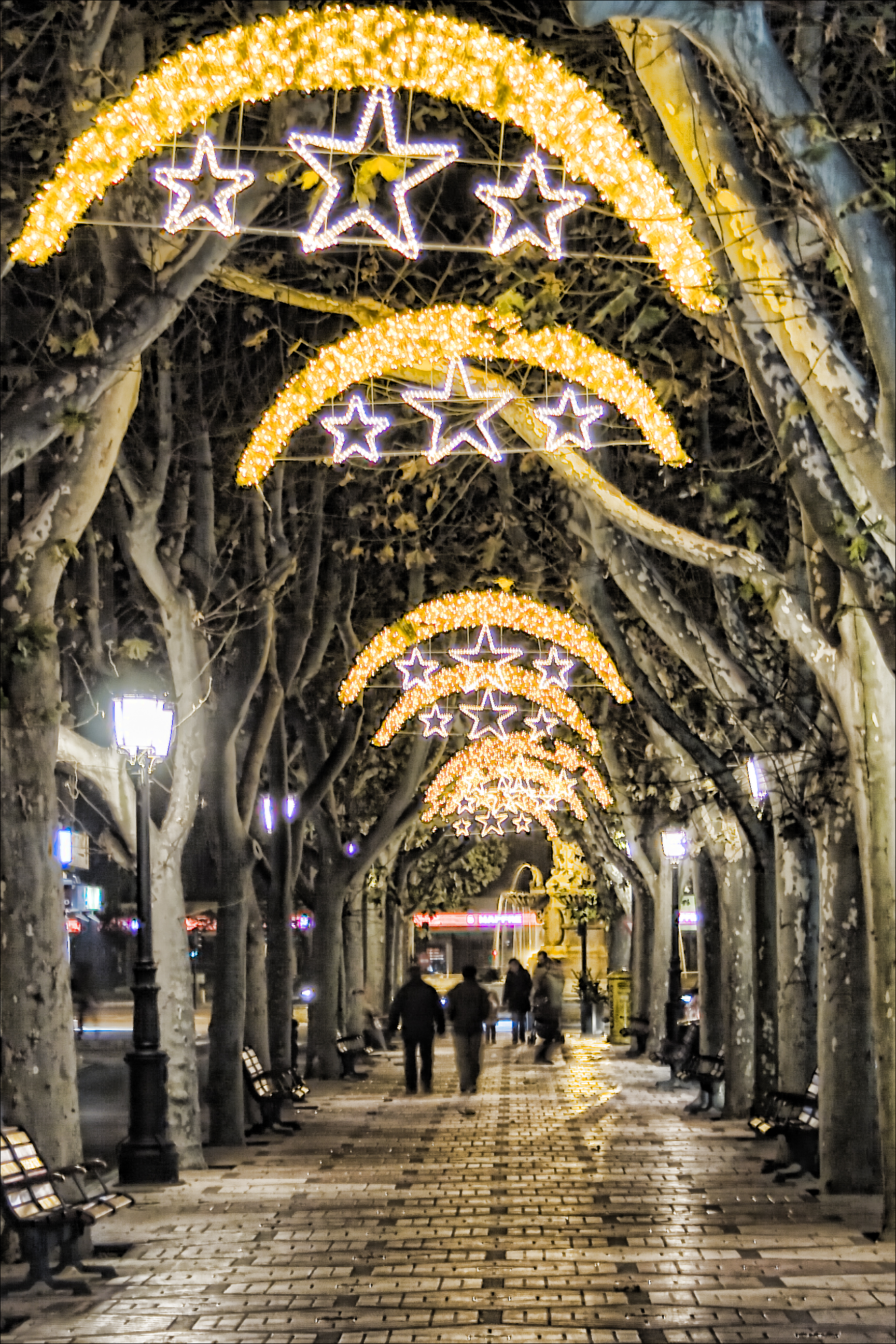 Empiezo a subir las fotos que hice en el I Photowalk Nacional Ojodigital "Luces de Navidad". Nos juntamos unos cuantos, y los más valientes terminaron en la Calle Tejares de cañas. Se puede ver en